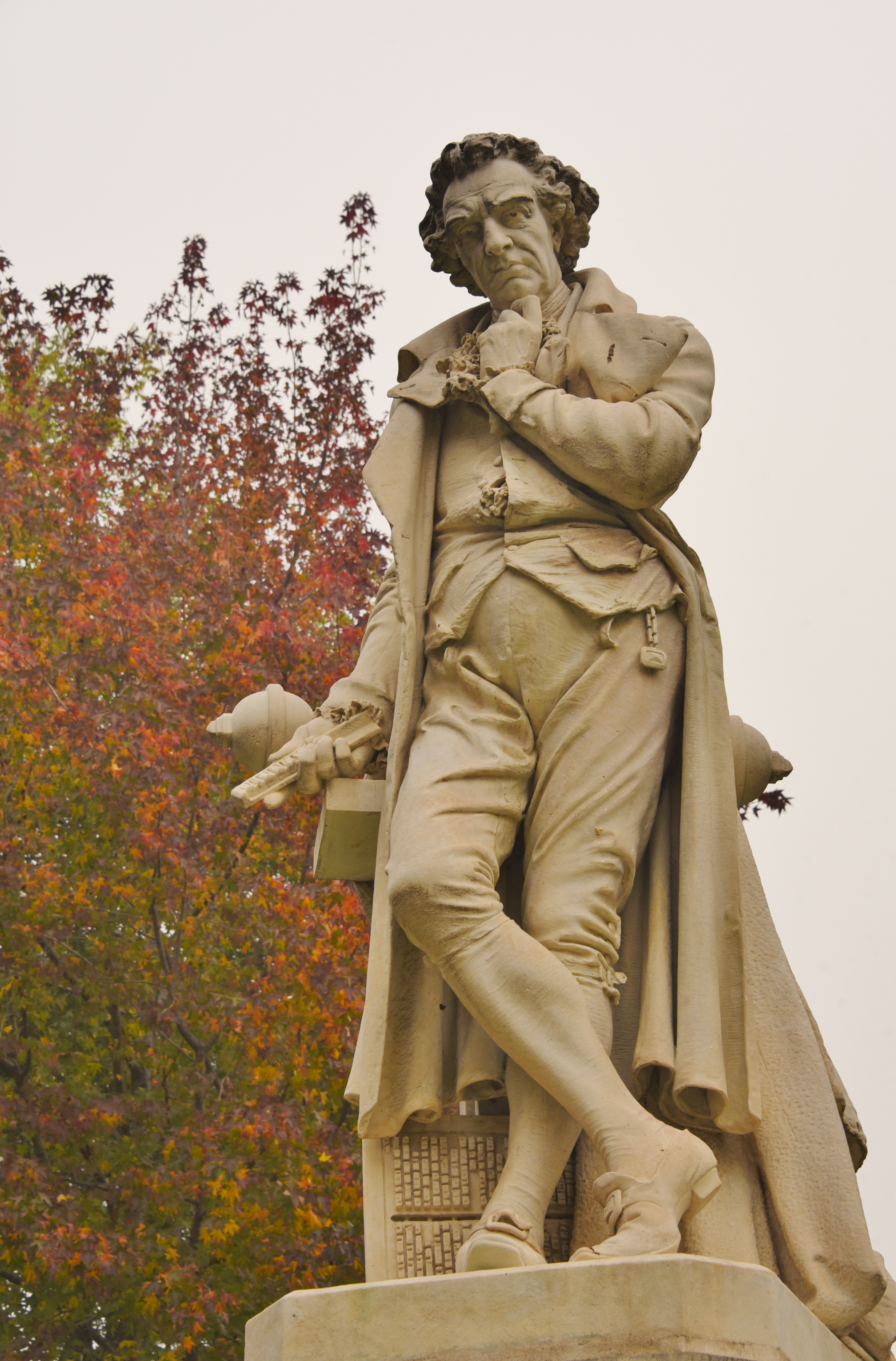 Giambattista Bodoni von Gabriele Ambrosio